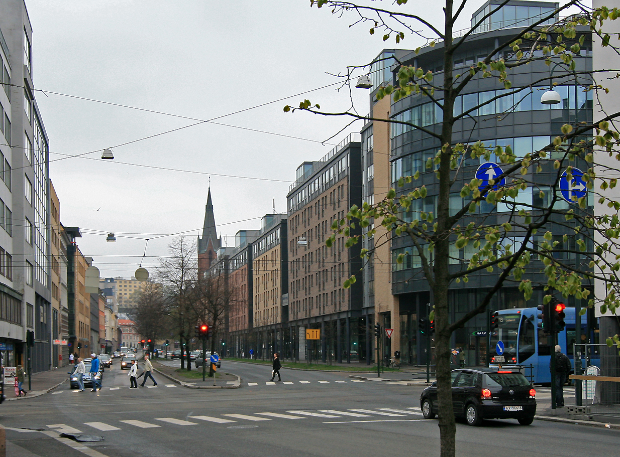 Hausmanns gate, Oslo, sett fra Storgata mot Fredensborg.